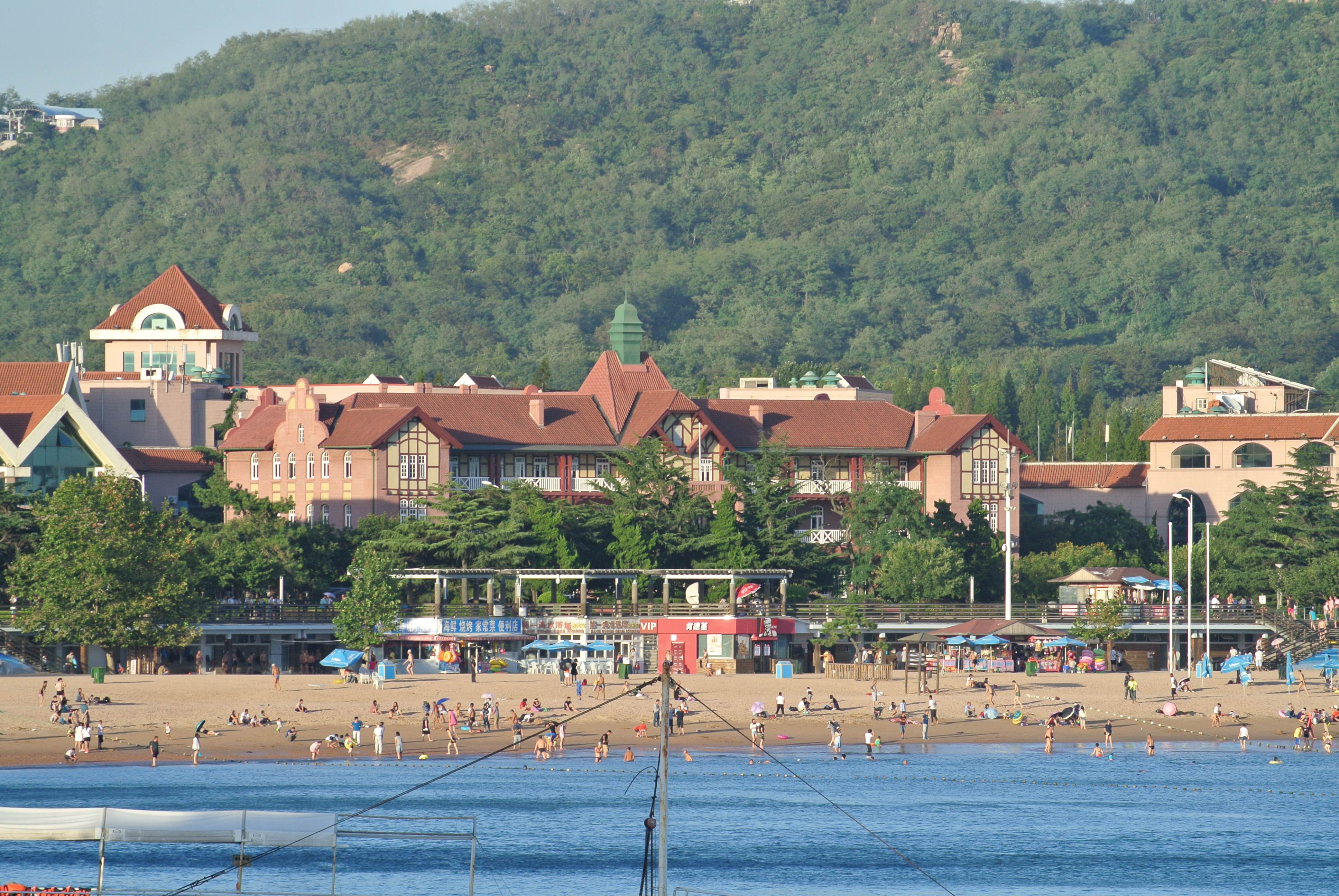 青岛海滨旅馆旧址及海水浴场